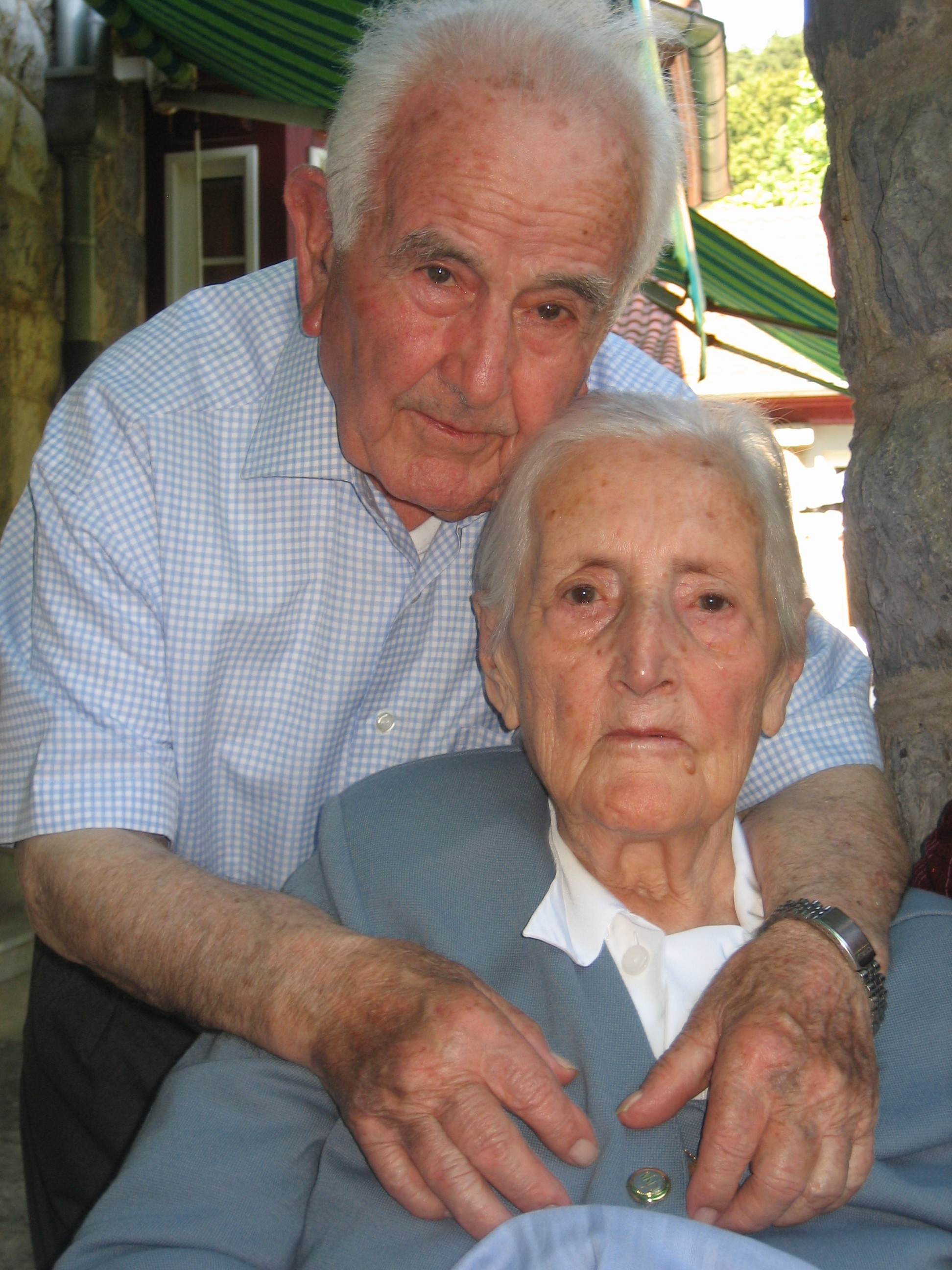 Gregorio García Antonio, alcalde de Sinlabajos y su hermana Claudia Marcelina Antonio